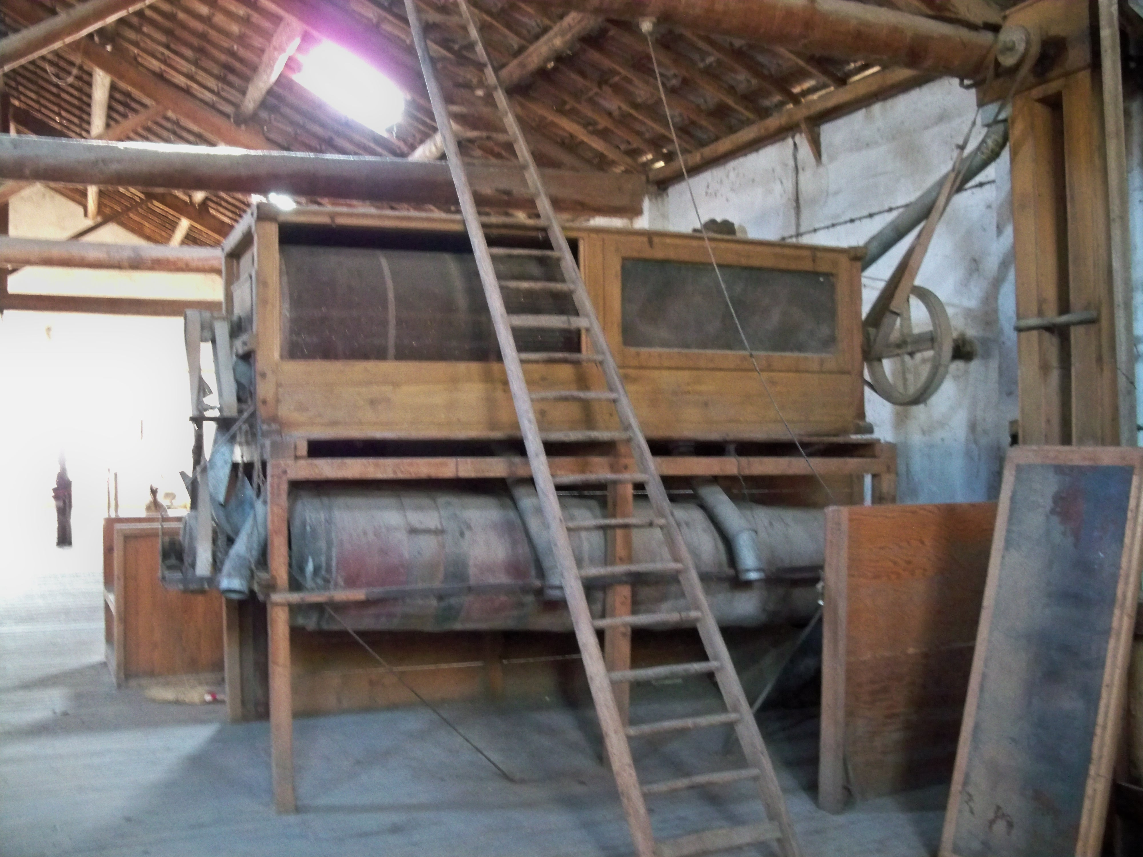 Intérieur de la Graineterie Aimé Roux, Carpentras (84) .